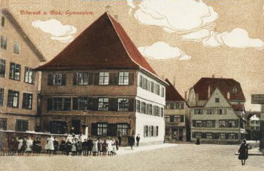 Wieland-Gymnasium in Biberach an der Riß, Germany